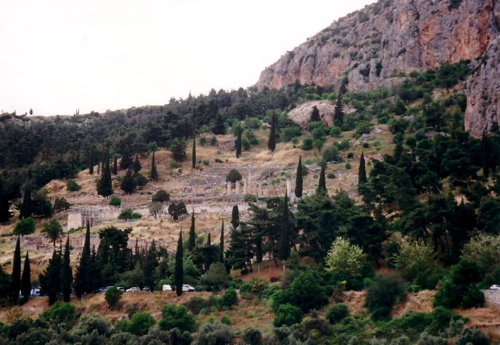 Das Orakel von Delphi war dem Apollon geweiht und gilt als das wichtigste Orakel im antiken Griechenland. Blick auf den Appollon-Tempel.